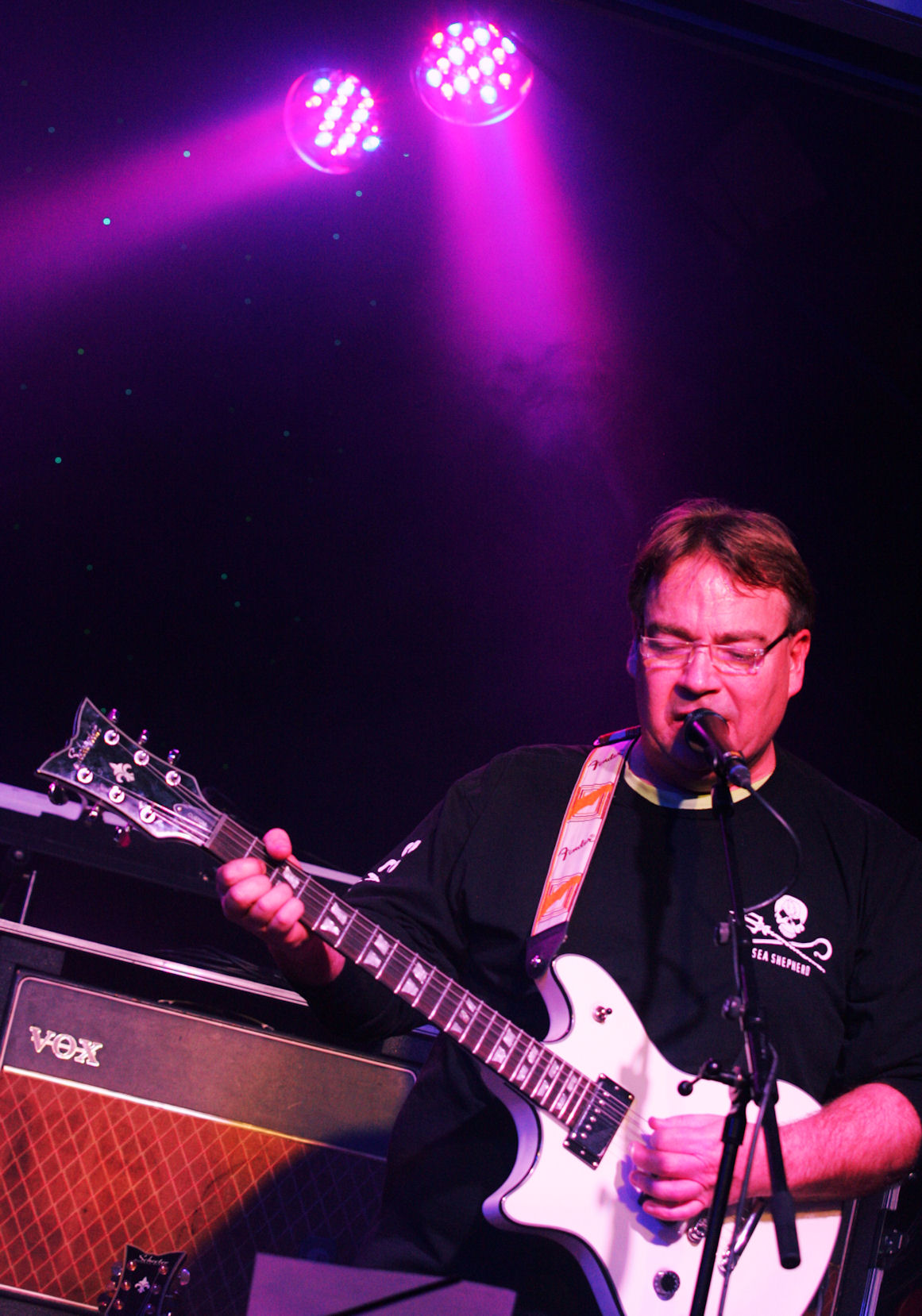 Larry Nelson, live februar 2012